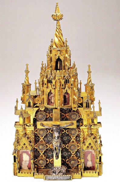 Nicolò Lionello Pace (1434) rame e argento dorati con smalti Museo Diocesano - Trento